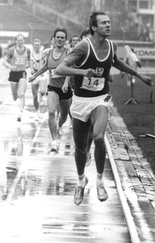 Detlef Wagenknecht ADN-ZB Thieme 12.5.84 Erfurt: Leichtathletik-Sportfest- Über 800 m siegte Detlef Wagenknecht vom SC Dynamo Berlin in einer Zeit von 1:45,86. Die Athleten trugen ihre Wettkämpfe bei Regen und Kälte aus.